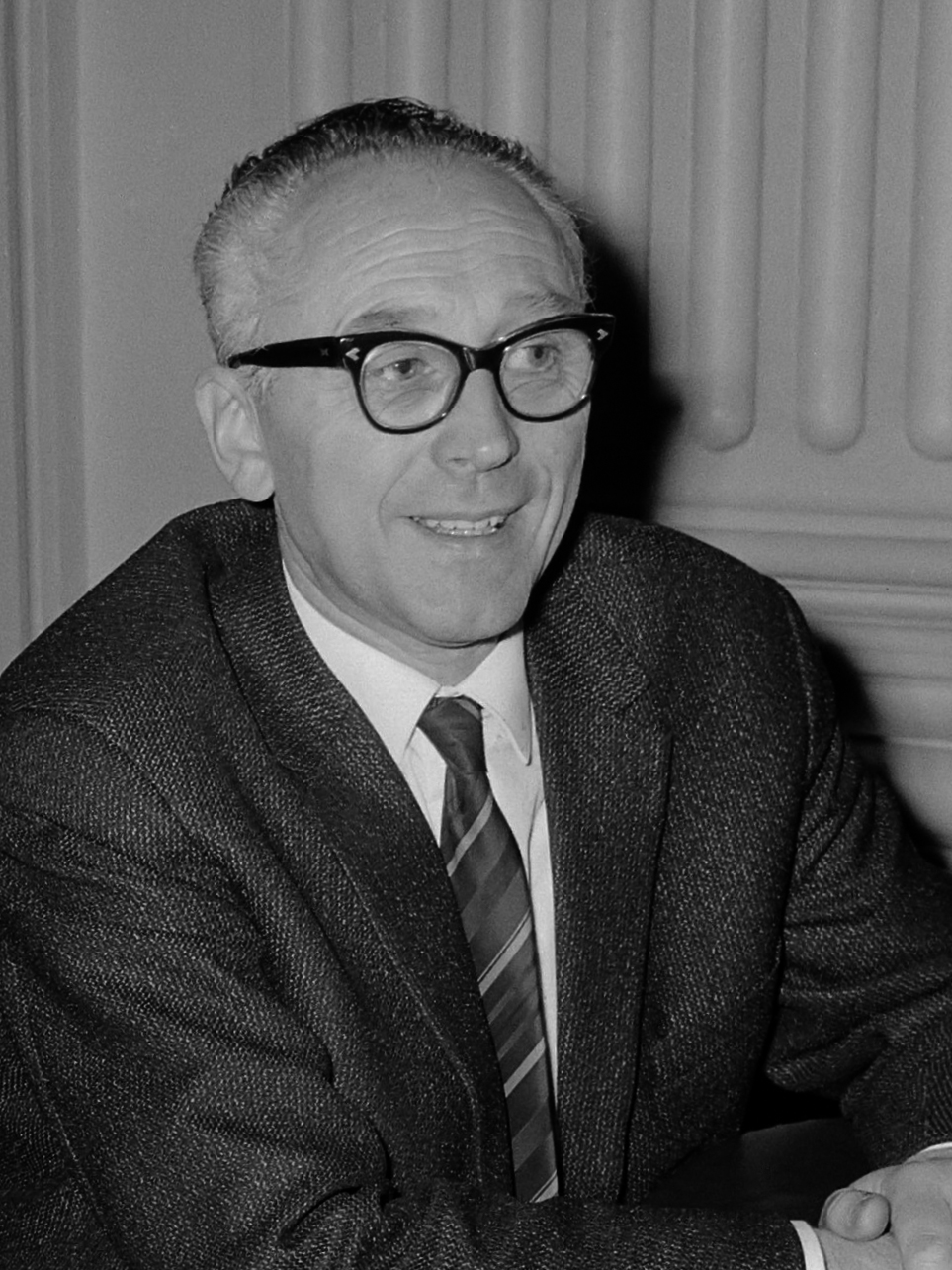 Tweede Kamer , dr. J. G. H. Tans in de bank naast mevrouw G. Brautigam 27 april 1965